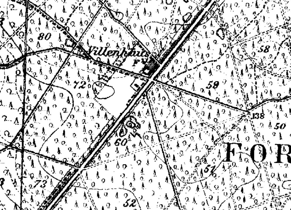 Ausschnitt von Burgus Villenhaus bei Köln